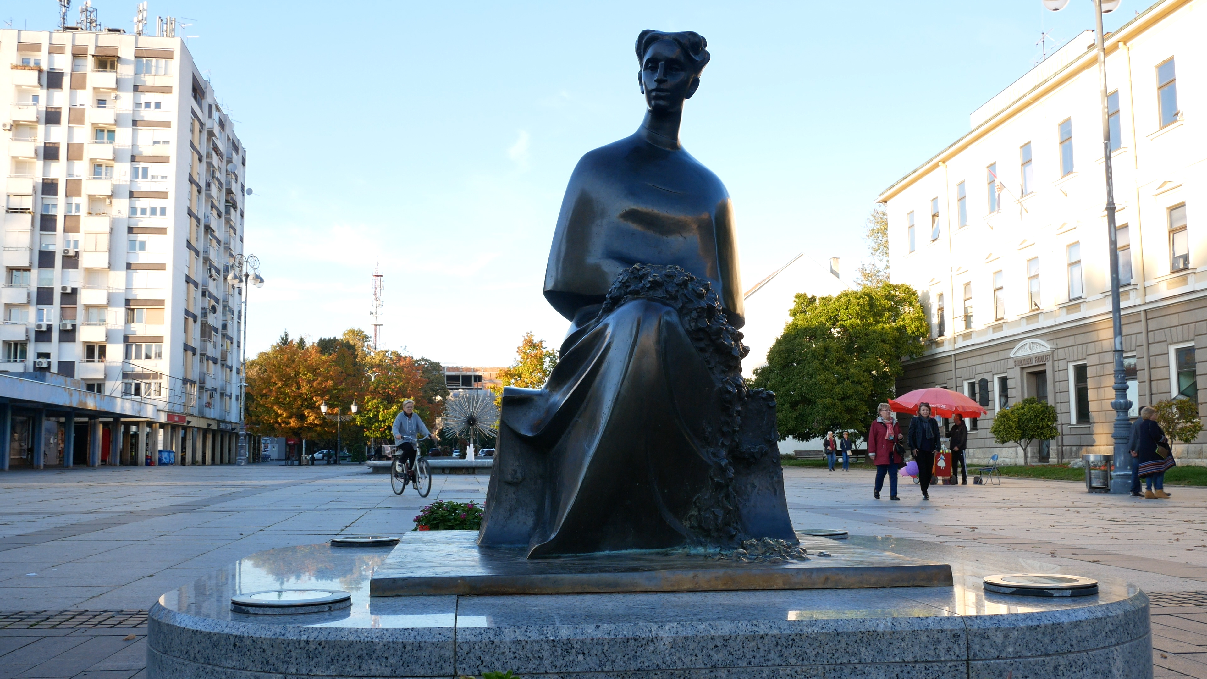 Kip Ivane Brlić Mažuranić u Slavonskom Brodu